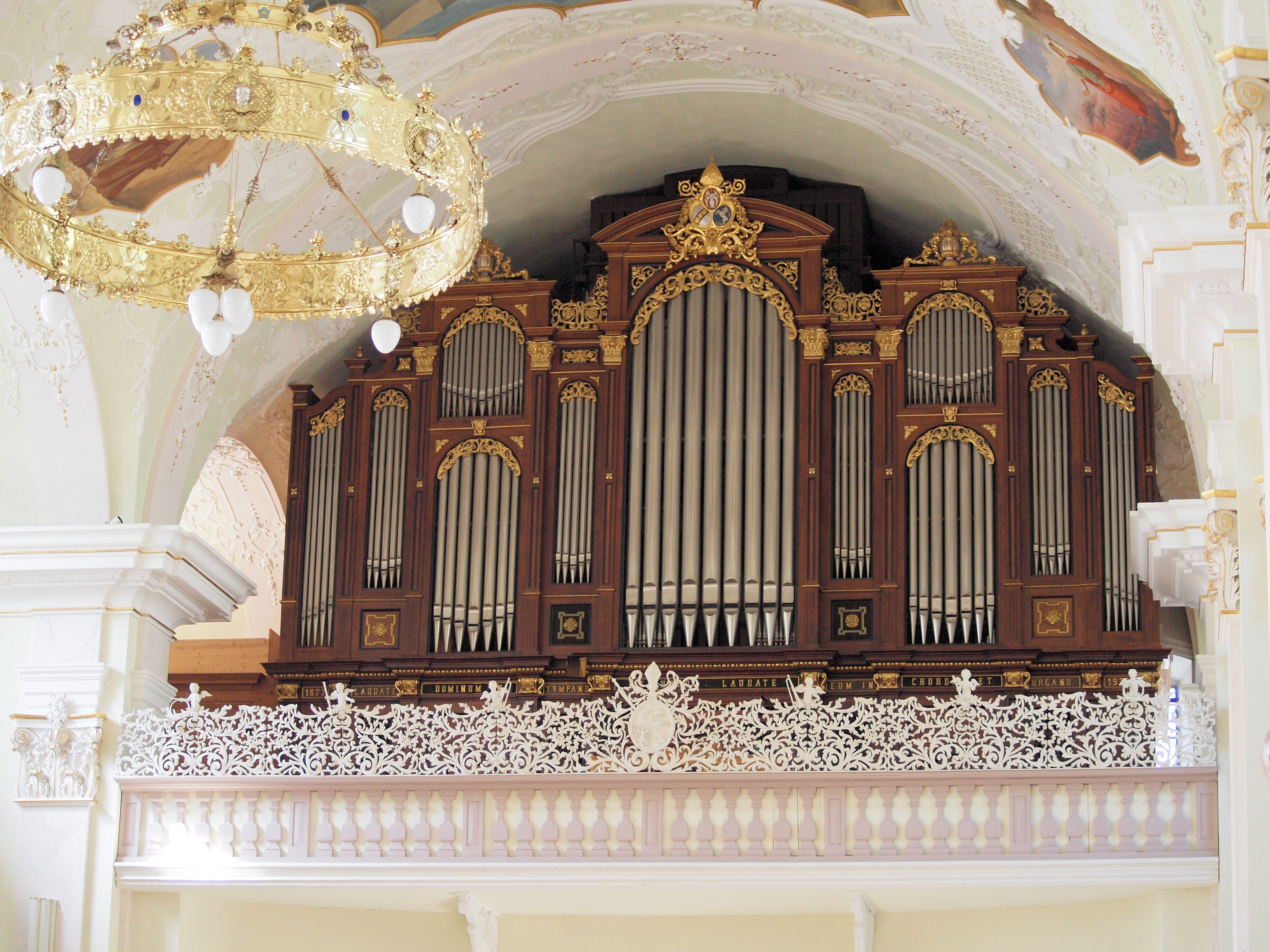 Innenaufnahmen aus der Kloster - und Pfarrkirche Engelberg. Die Hauptorgel.